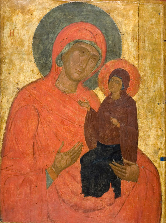 Η Αγία Άννα με την Παναγία Τέλη 15ου αι. Αγία Άννα εν. Αγίου Ιωάννου, Βέροια